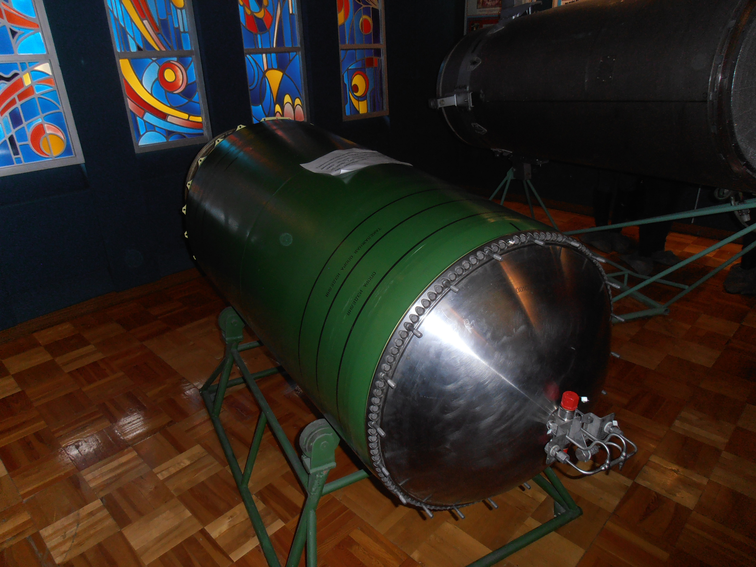 Твердотопливный ракетный маршевый двигатель 9Д140 (I ступень) для ракеты 9М83 зенитно-ракетного комплекса "С-300В". Музей ОАО "Тюменские моторостроители" (Тюмень).